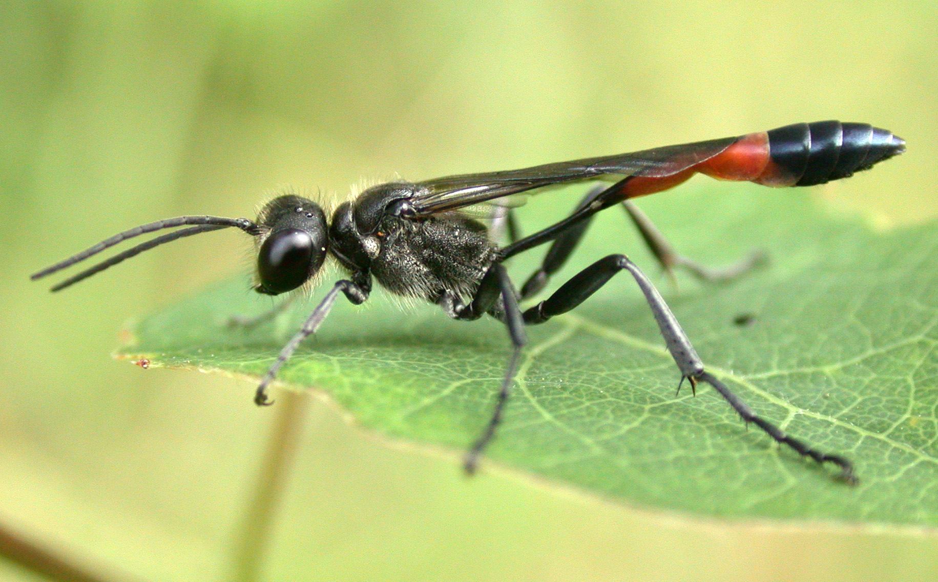 Ammophila sabulosa(?) male